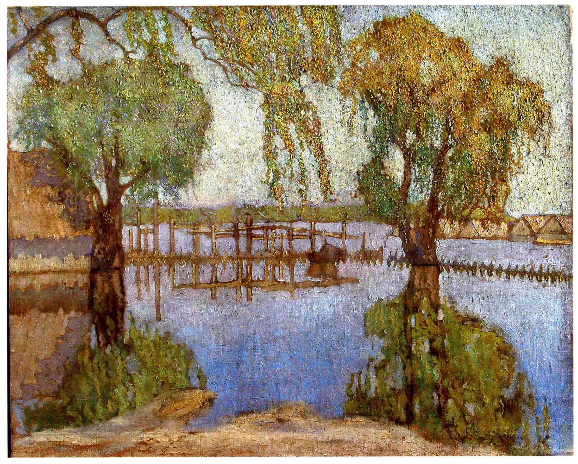 Гауш А.Ф. "Большая вода", 1900-е, холст, масло, 69 х 86. Работа находится в частном собрании.